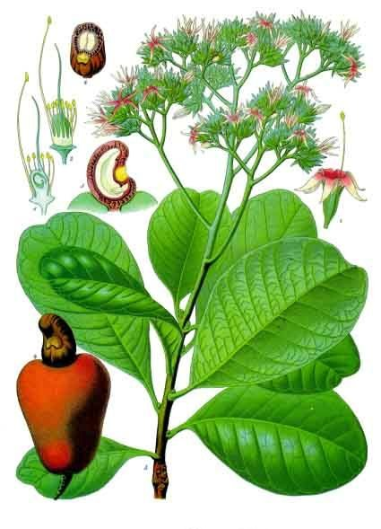 Kaschu. A Blühende Pflanze. 1 Blüte vergrössert ; 2 Stempel und Staubgefässe; 3 Dasselbe im Längsschnitt; 4 Frucht mit dem vergrösserten und reifen Fruchtstiel; 5 Frucht im Längsschnitt; 6 Frucht im Querschnitt.